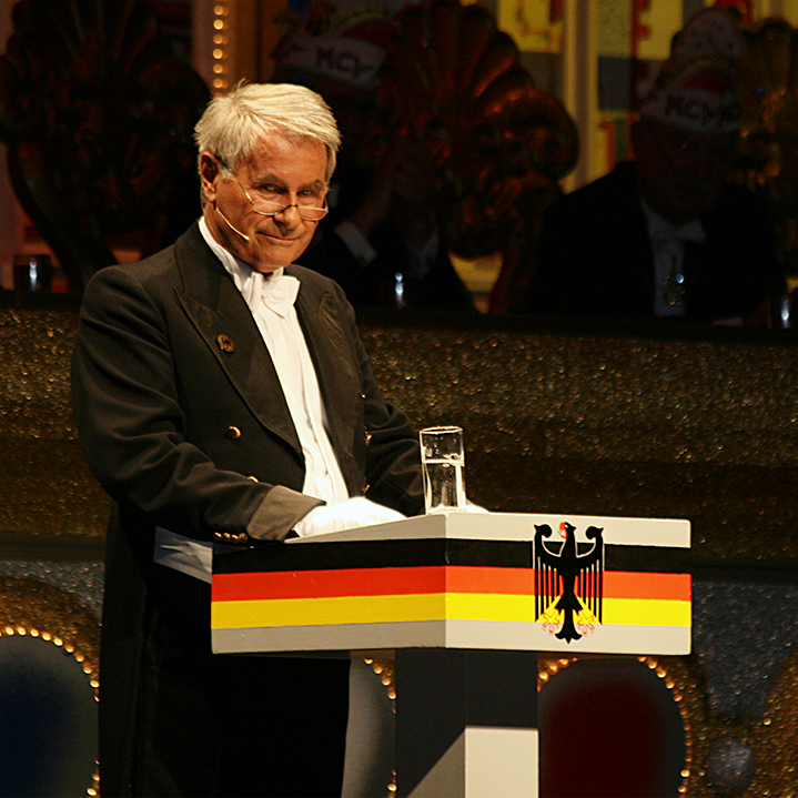 Jürgen Dietz in seiner Rolle als 'Der Bote vom Bundestag' während seines Auftritts bei der Prunk-Fremdensitzung 2010 in Mainz.